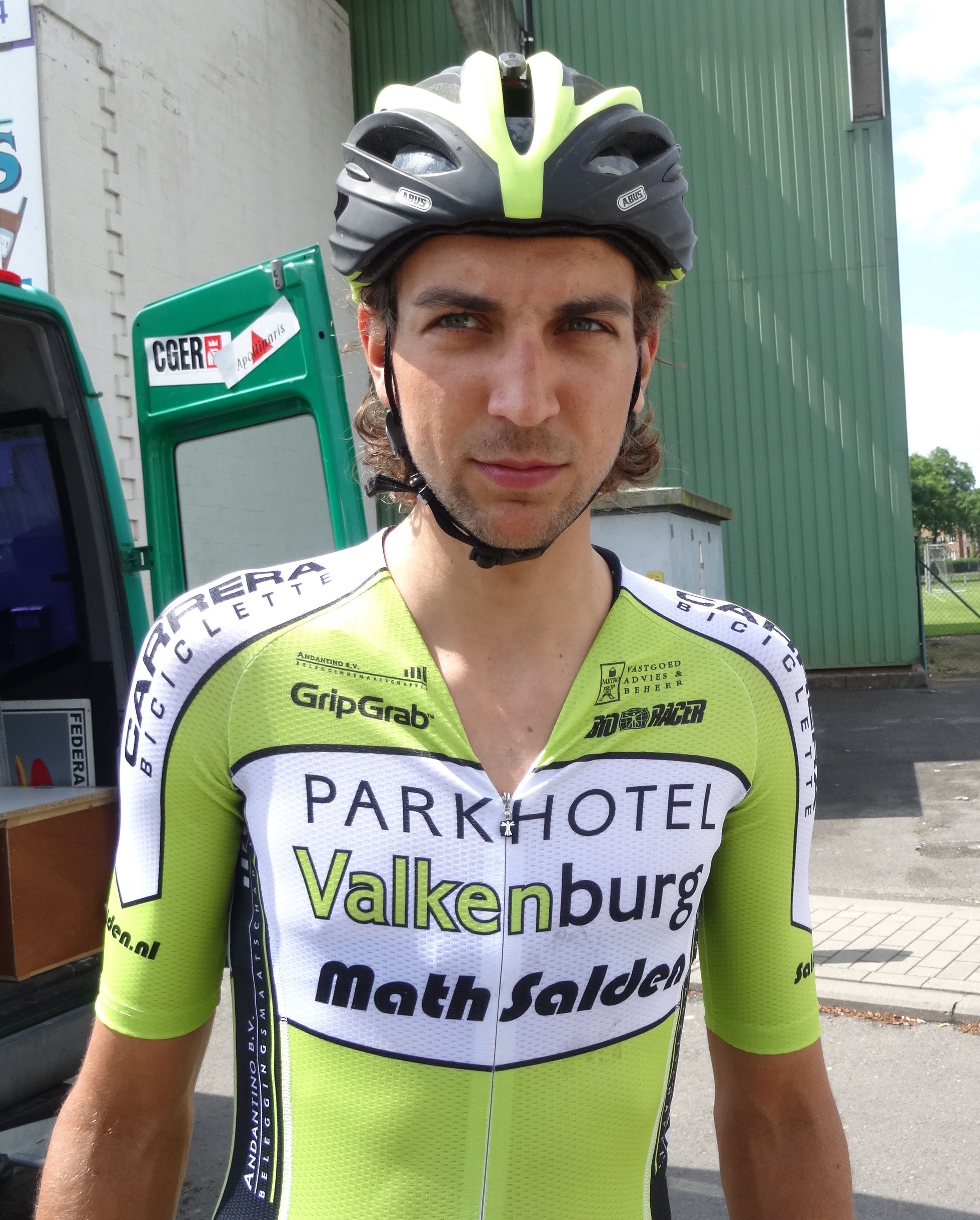 Reportage réalisé le dimanche 8 juin à l'occasion du départ du Mémorial Philippe Van Coningsloo 2014 à Wavre, Belgique.